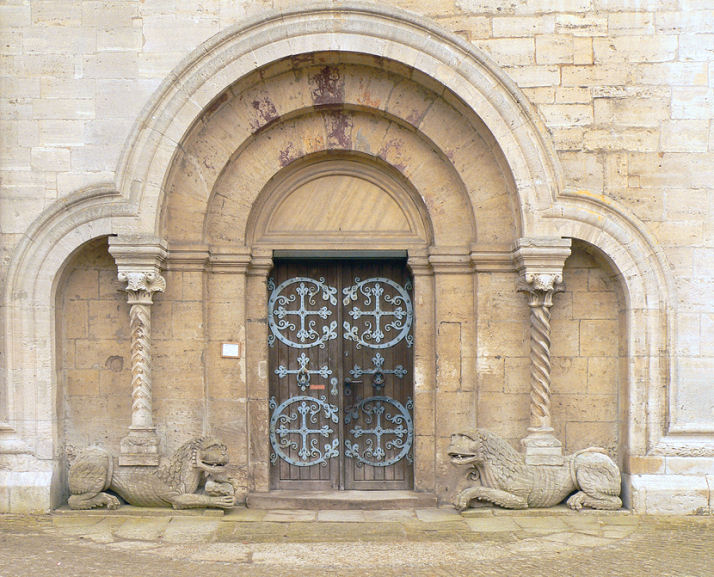 Summary Stiftskirche St. Peter und Paul (Kaiserdom) Königslutter Foto aufgenommen von Benutzer Axel Hindemith, April 2006 Licensing 20:45, 3. Apr 2006 Axel Hindemith 546 x 667 (116979 Byte) ( Stiftskirche St. Peter und Paul (Kaiserdom) Königslutter Foto aufgenommen von Benutzer :de:Benutzer:AxelHH|Axel Hindemith , April 2006)